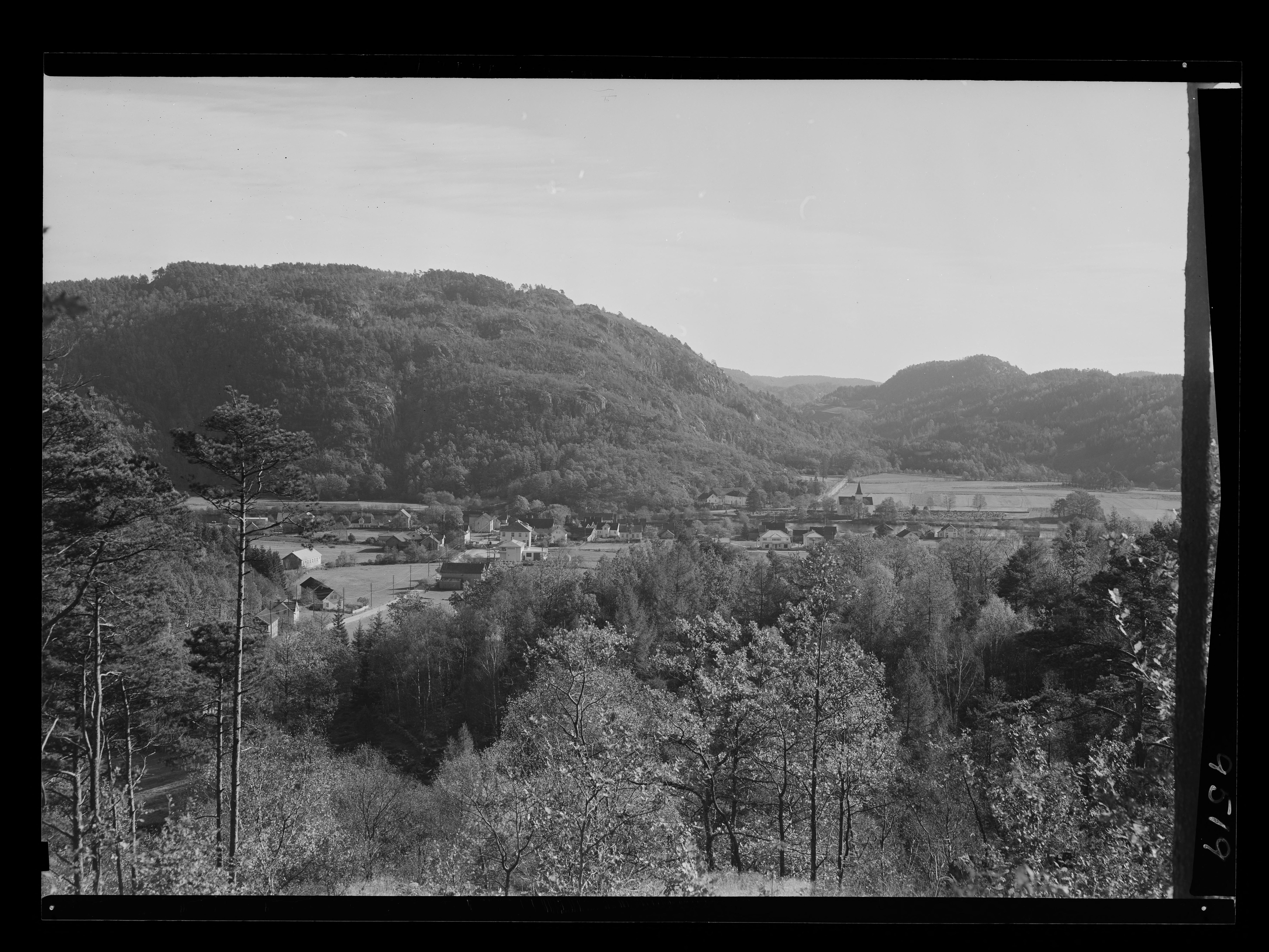 Bildet er hentet fra Nasjonalbibliotekets bildesamling. Anmerkninger til bildet var: Fotograf:Ukjent Vigeland, Lindesnes, Vest Agder